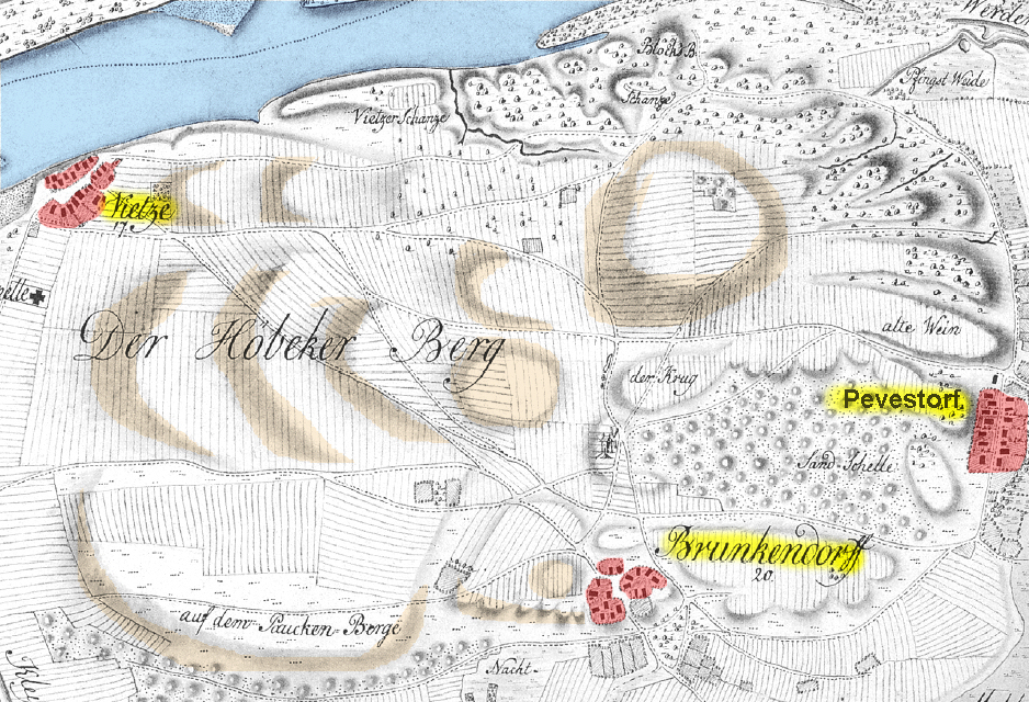 Höhbeck als Kurhannoversche Landesaufnahme von 1776, nachträglich koloriert und mit Pevestorf beschriftet